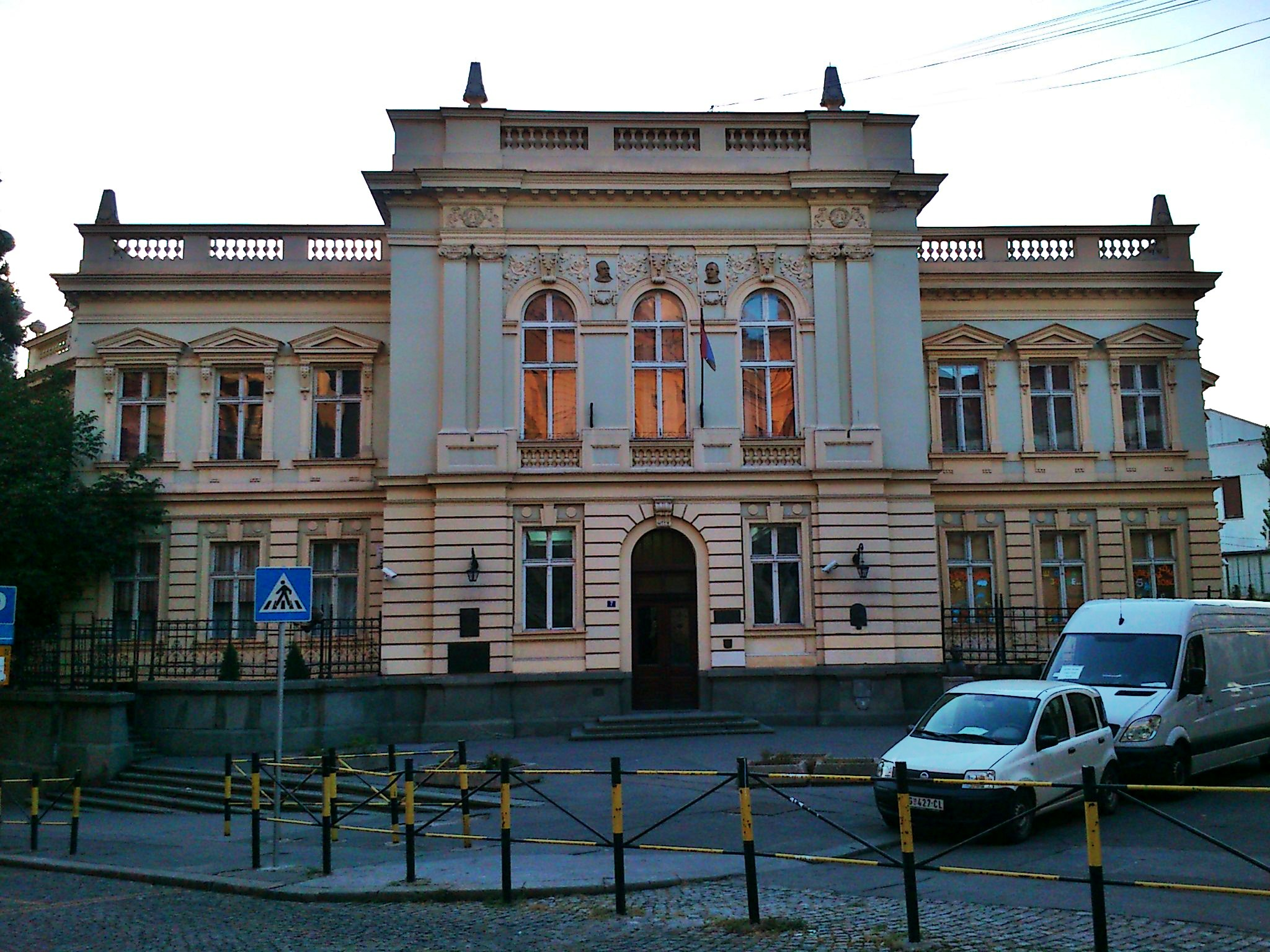 Основна школа Краљ Петар Први